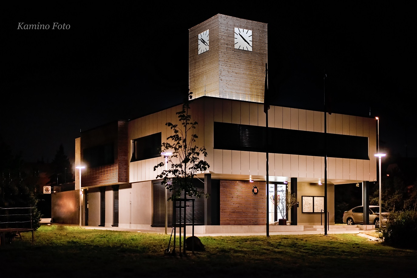 {názevŠablona:Infobox - česká městská část }